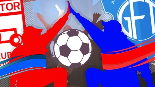 نمایه - داربی تبریز